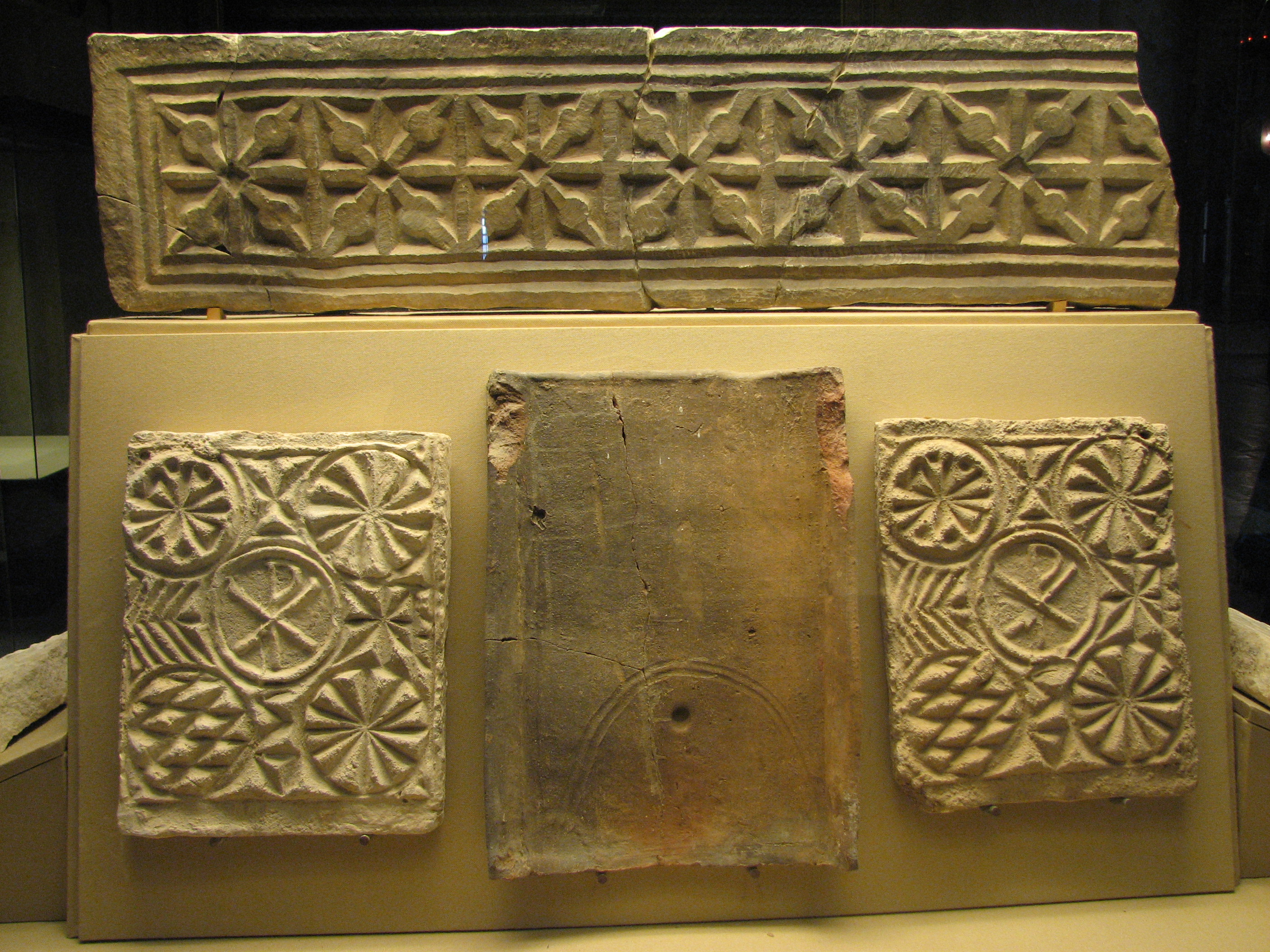 Museo de la Mezquita de Córdoba (España).